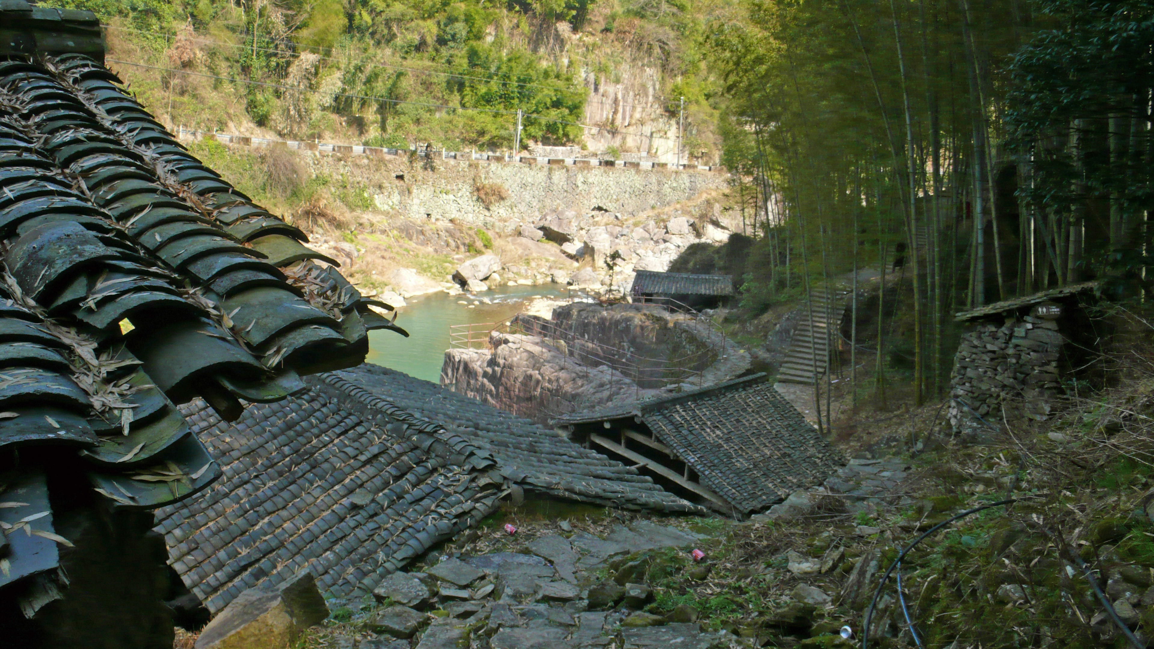 泽雅四连碓造纸作坊。